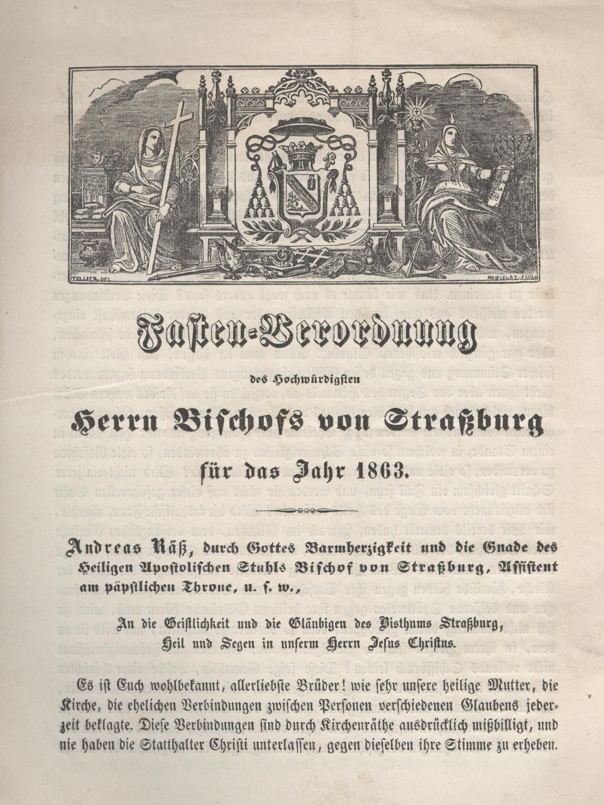 Bischof Andreas Räß, Straßburg, Fastenhirtenbrief 1863